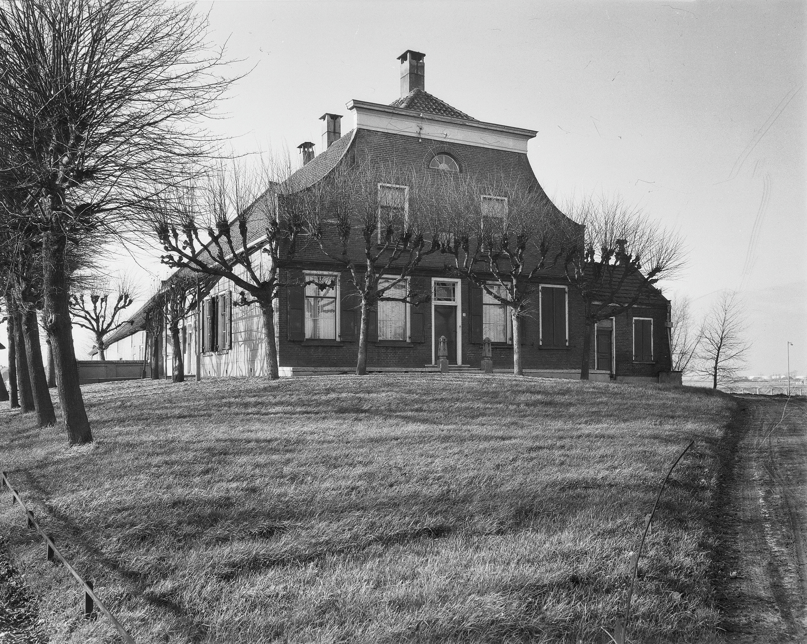 Hoeve Rozenstraat 2, exterieur